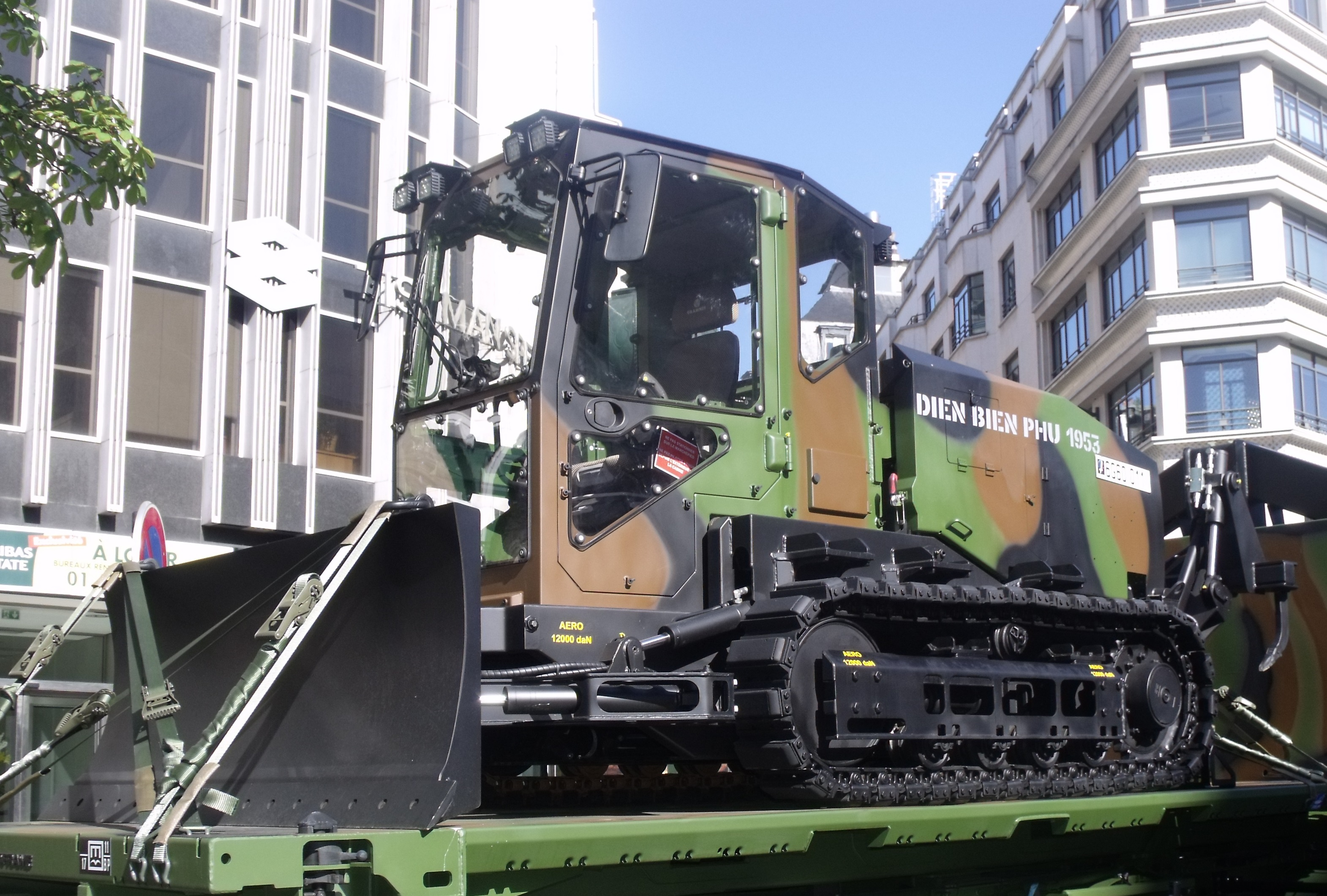 Vu ici lors des préparatifs du défilé du 14 juillet 2017 à Paris. Ce matériel est mis en œuvre par le 17ème régiment du génie parachutiste.